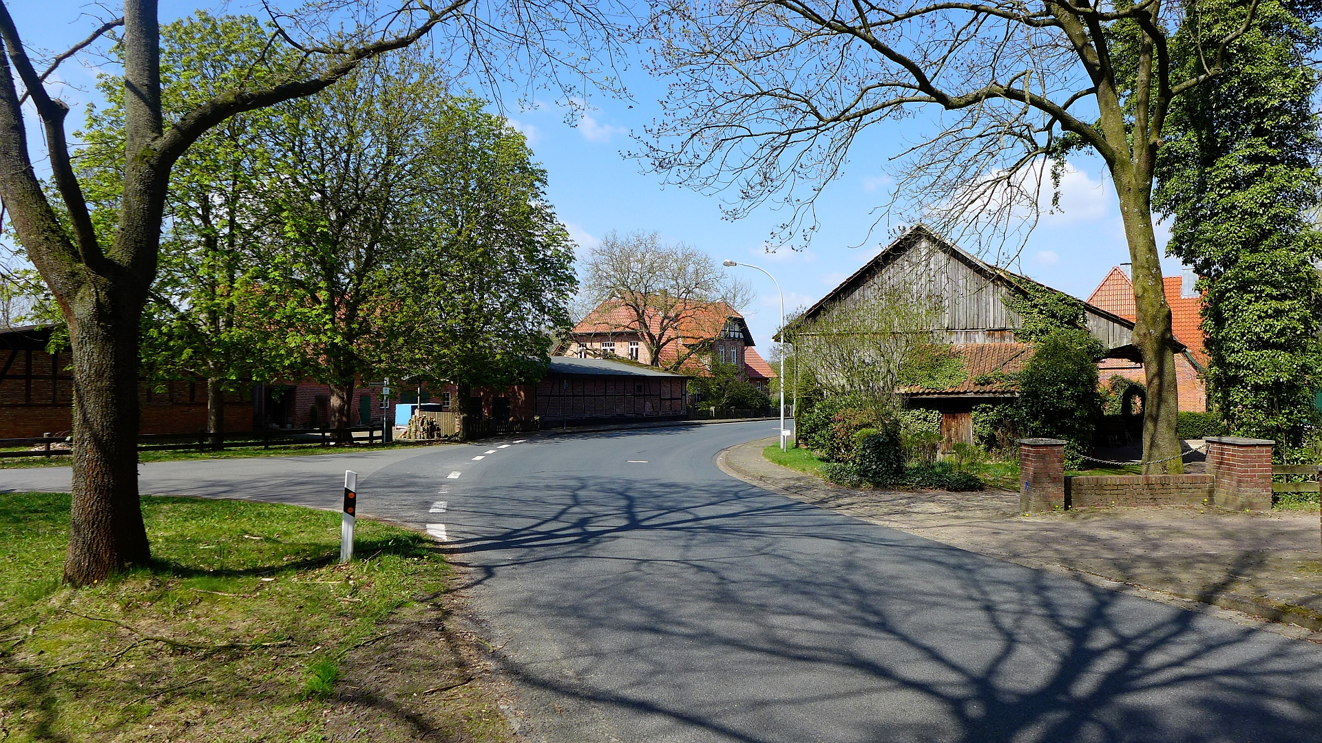 Dorfansicht im Bereich der Kreisstraße K208.